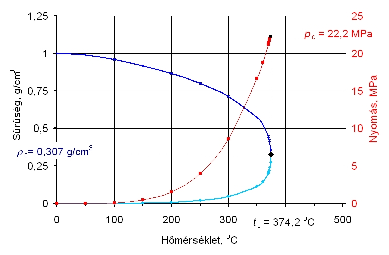 A víz sűrűségének hőmérsékletfüggése a kritikus állapotig